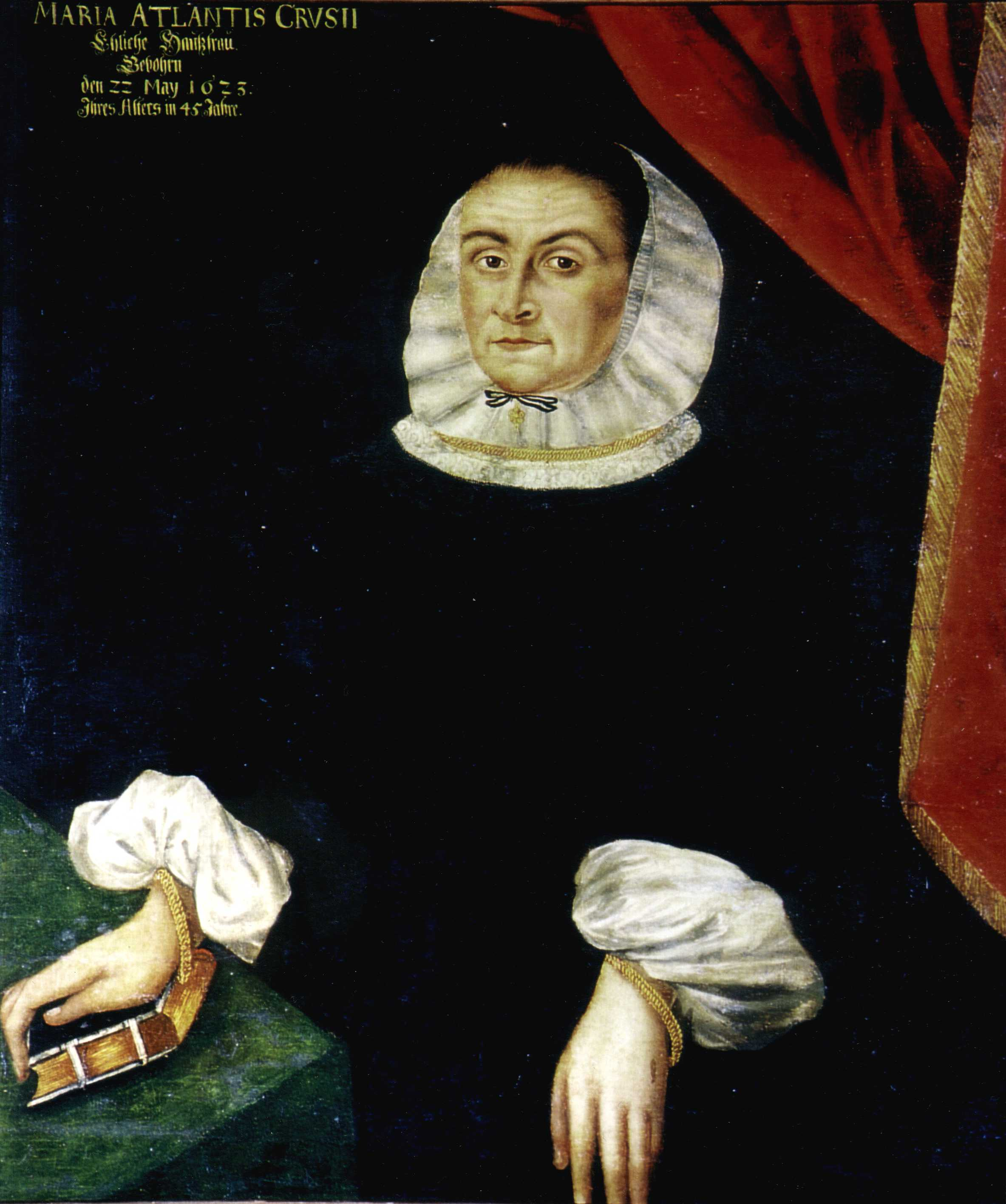 Maria Wetzel (1623-1678) im Alter von 44 Jahren, zweite Ehefrau des Atlas Crusius, Regierender Bürgermeister zu Chemnitz. Ölgemälde eines unbekannten Künstlers, Stadtarchiv Chemnitz. Als Leihgabe im Alten Rathaus Chemnitz, Standesamt.